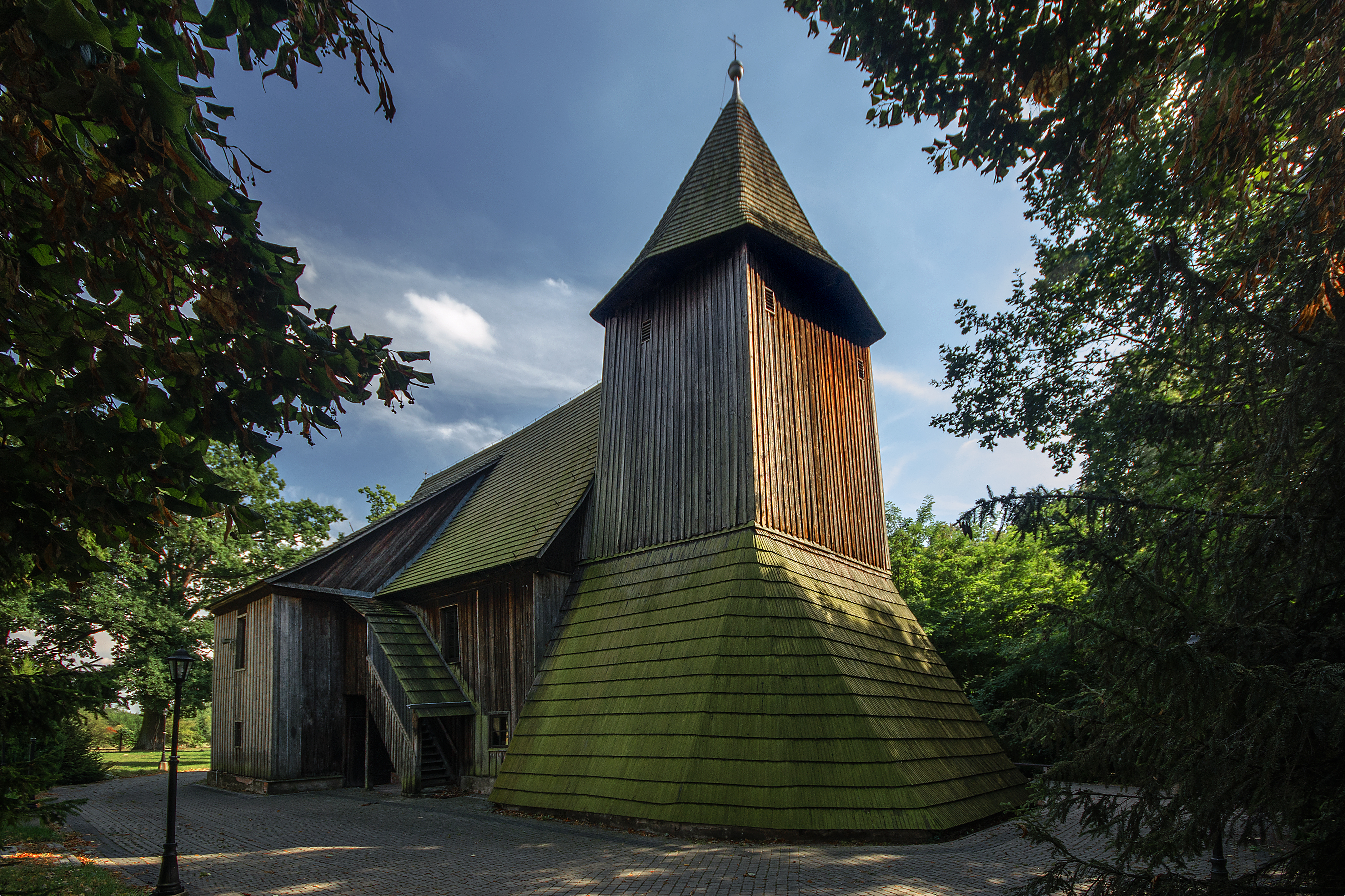 Komorzno, kościół ewangelicki, ob. rzym.-kat. fil. p.w. św. Jadwigi, 1753